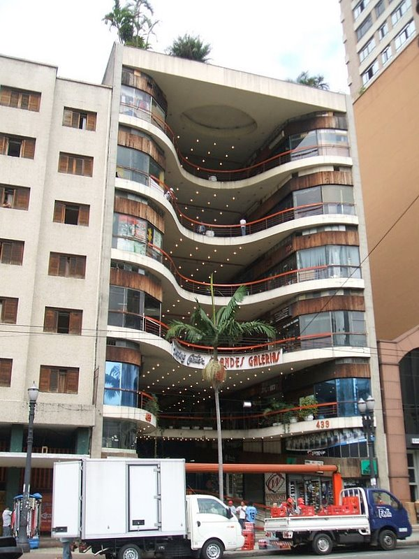 Galeria do Rock ("Shopping Grandes Galerias") na Av. São João, distrito da República, São Paulo, Brasil.